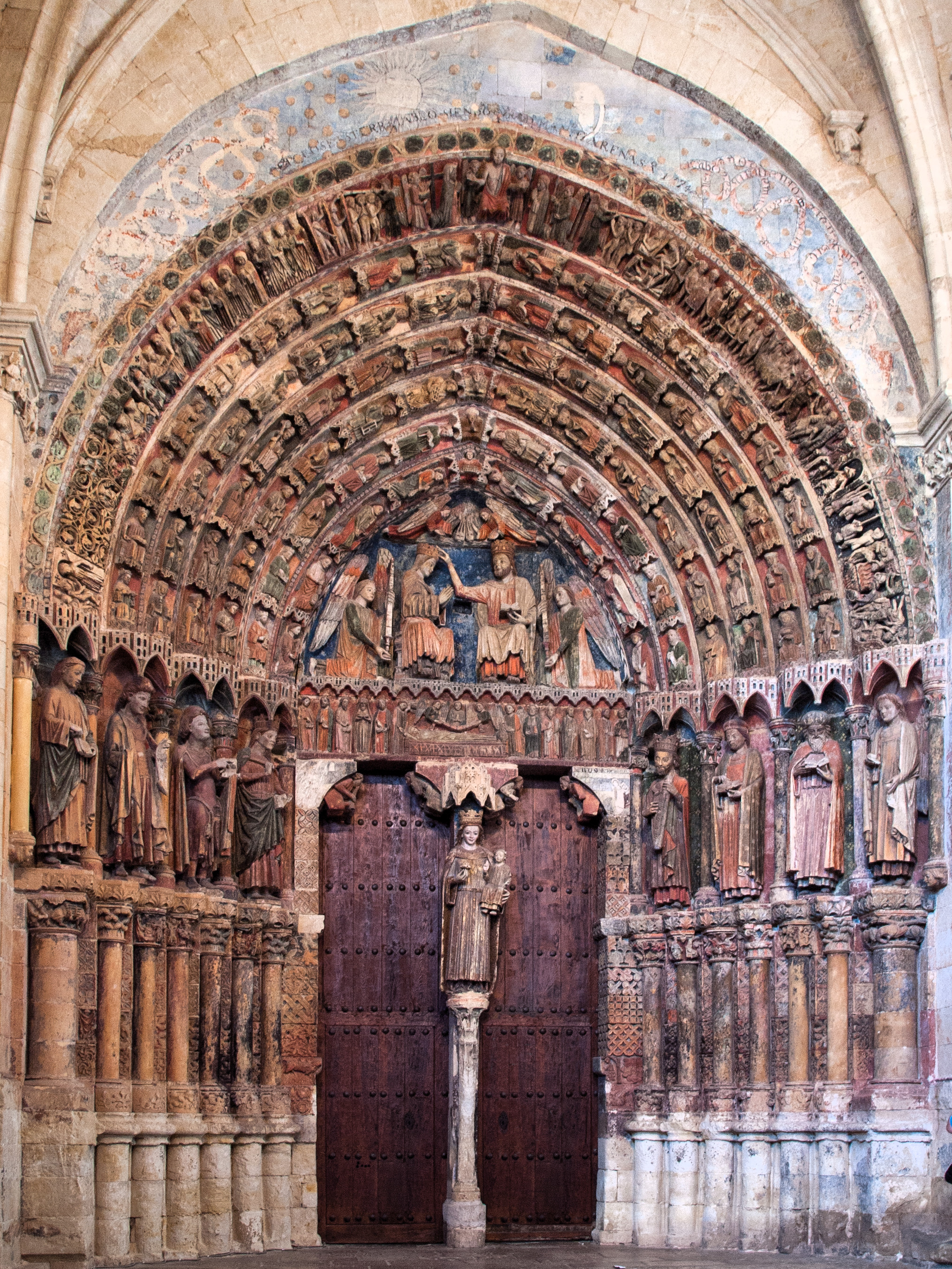 Portico de la colegiata de Santa Maria, Toro